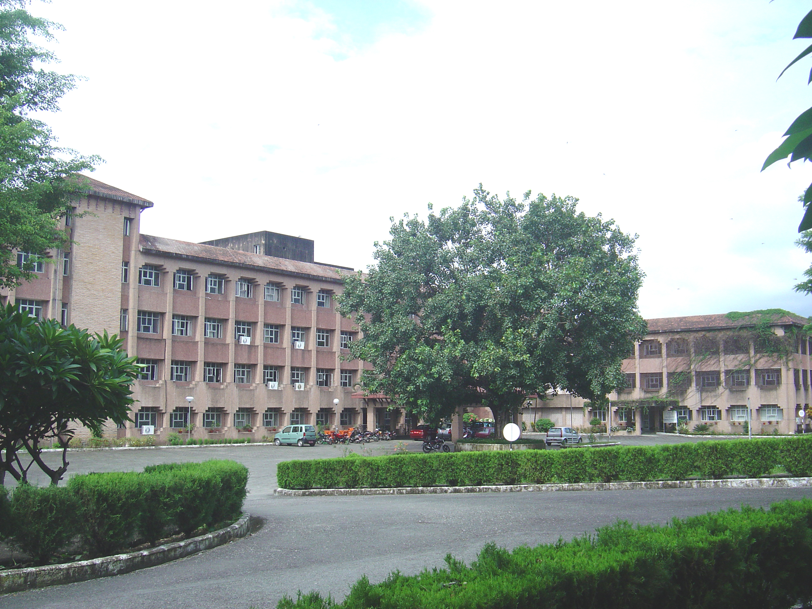 नेपाली: मेडीकल कलेज भवन, वी.पी. कोइराला स्वास्थ्य विज्ञान प्रतिष्ठान